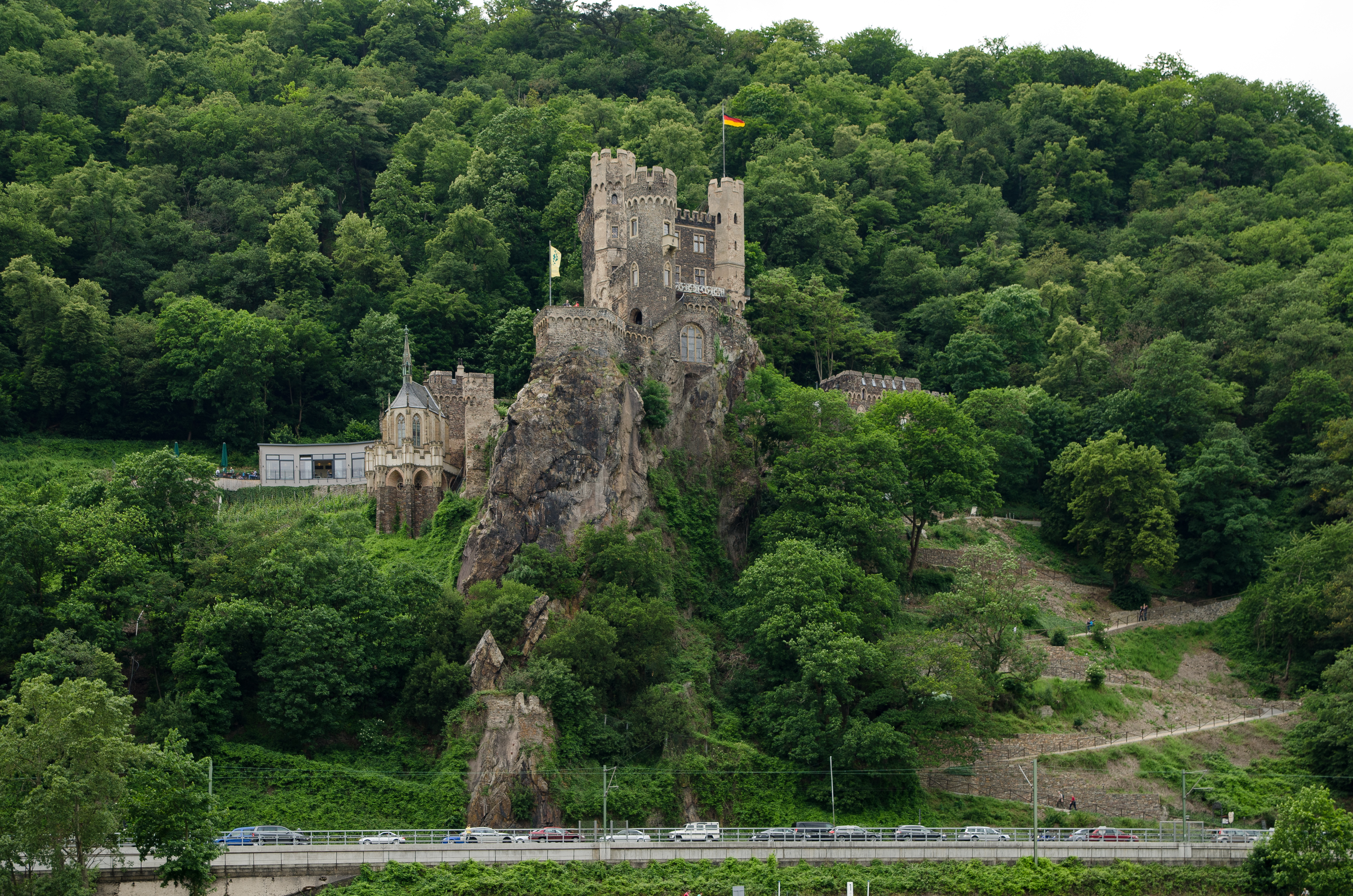 Burg Rheinstein von Osten, mit Aufstieg vom Rheinufer